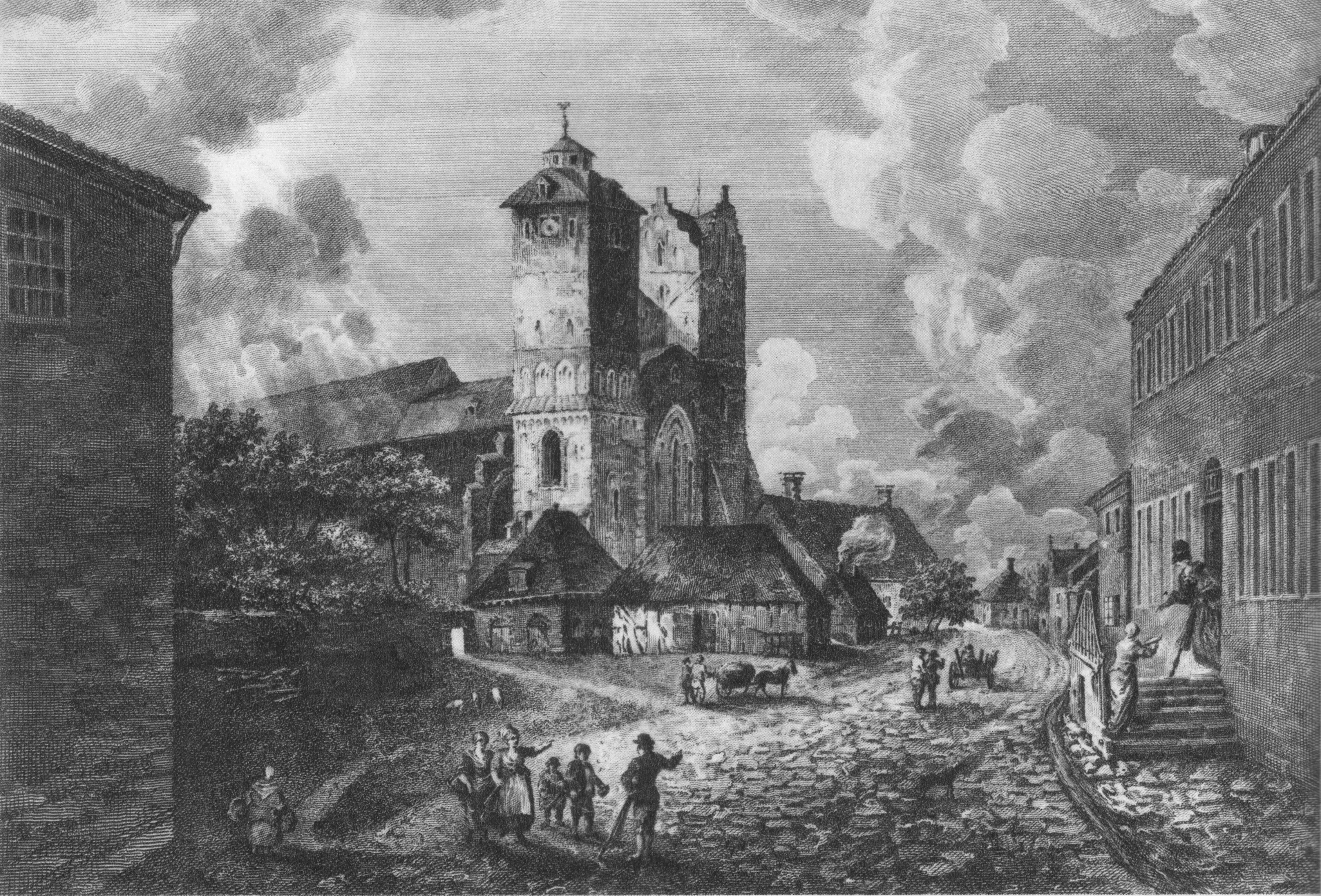 Lunds domkyrka och Lilla torg. Etsning från 1782. Längst till vänster det så kallade "Härbärget" som revs i samband med den nya universitetsbyggnadens uppförande på 1870-talet. De små byggnaderna omkring domkyrkan är numera försvunna. Längst till vänster syns domkyrkans spruthus, byggt 1775 och rivet 1836; till höger om detta ligger stadens våghus byggt på 1770-talet och rivet 1838; söder om detta de så kallade matbodarna. Nedanför dessa, mitt för domkyrkans västfasad låg den medeltida domskolan, 1763 ombyggd och upplåten till universitetet för att inrymma akademikontor, musiksal, auktionskammare samt ett kemiskt laboratorium och därför kallat "Chemicum"; huset revs 1832.